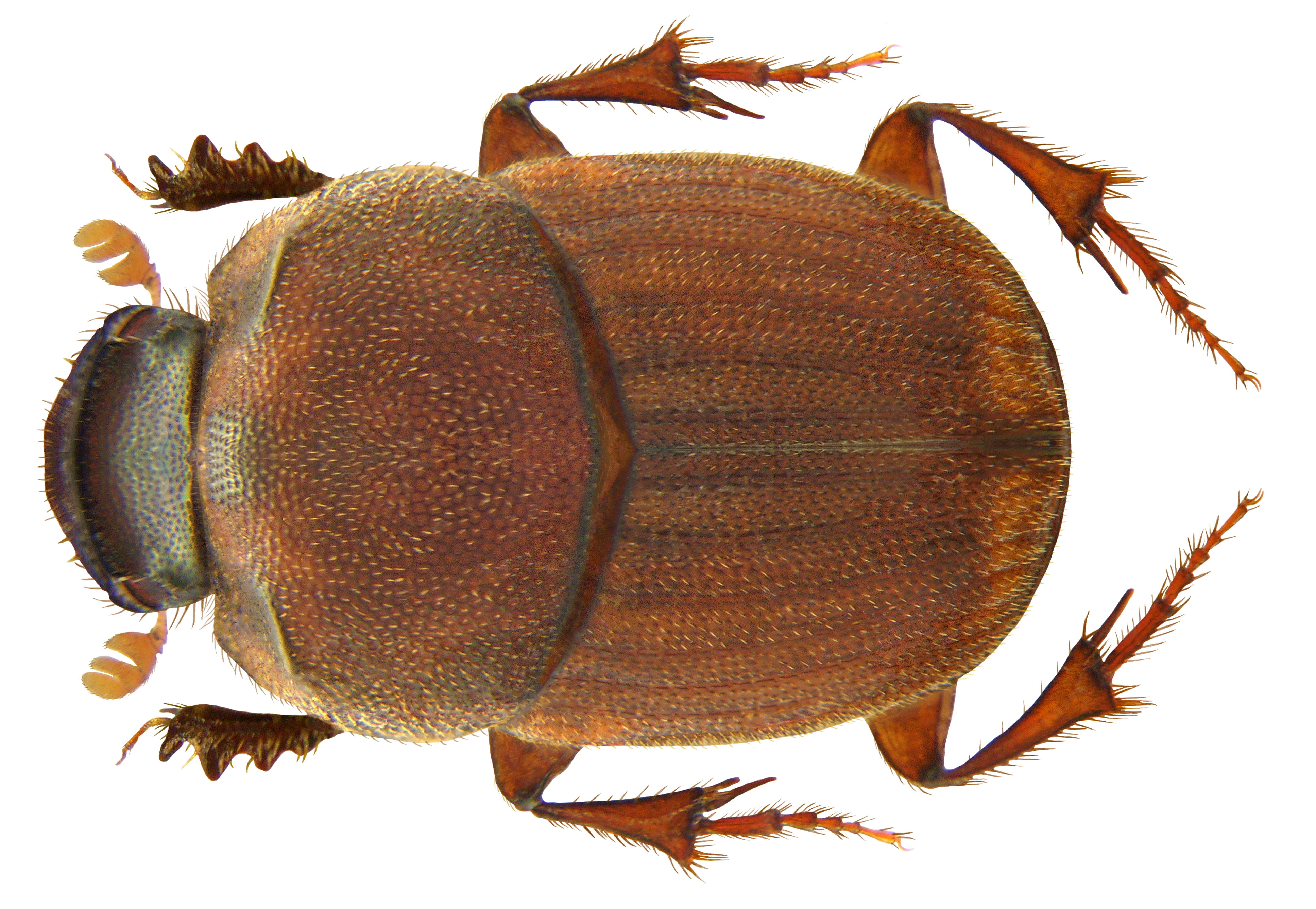 Familie: Scarabaeidae Groesse: 7,3 mm Fundort: Gambia, Serekunda leg. U.Schmidt, 1990; det. Ph.Walter, 2012 Photo: U.Schmidt, 2009